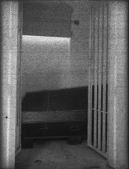 Беларуская (тарашкевіца): Воўчын (Voŭčyn), пахавальня караля і вялікага князя Станіслава Аўгуста Панятоўскага (Stanisłaŭ Aŭgust Paniatoŭski)